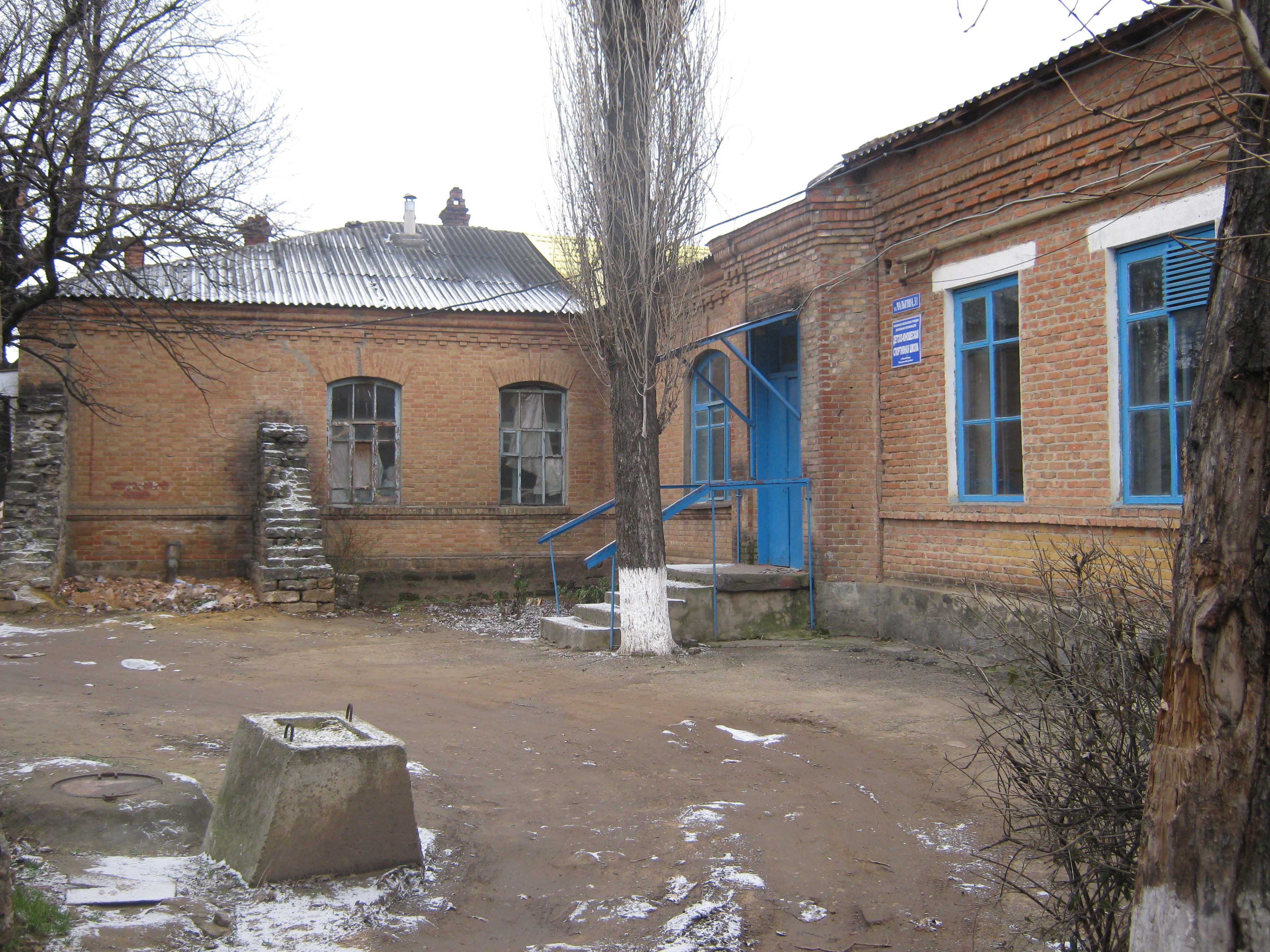 Здание детской спортивной школы в г. Светлограде